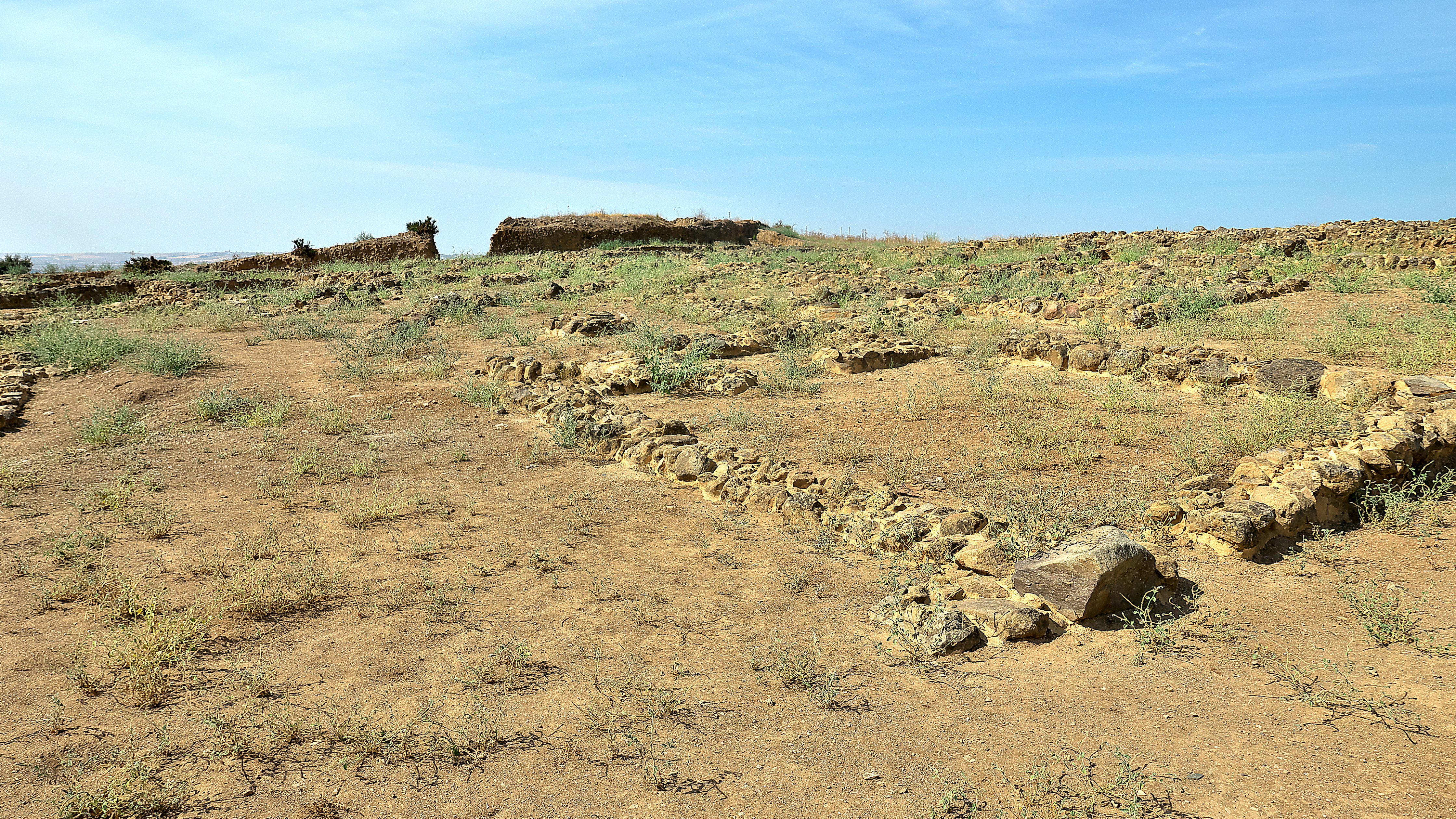 La ciudad tartésica estaba amurallada (s. VIII a.C.)